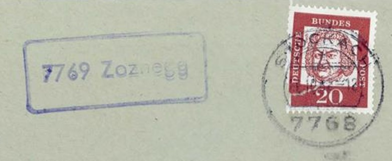 Deutschland (D) - Baden-Württemberg (BW) - Landkreis Konstanz (KN) - Mühlingen - Zoznegg: Poststempel 1964